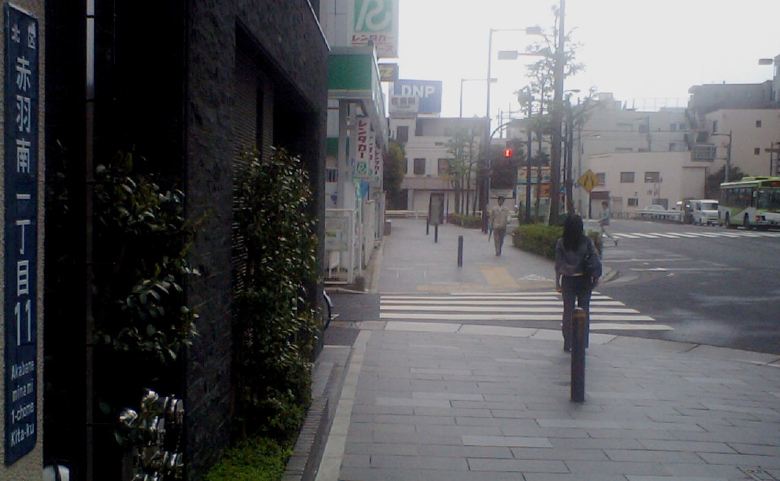 東京都北区赤羽南一丁目。